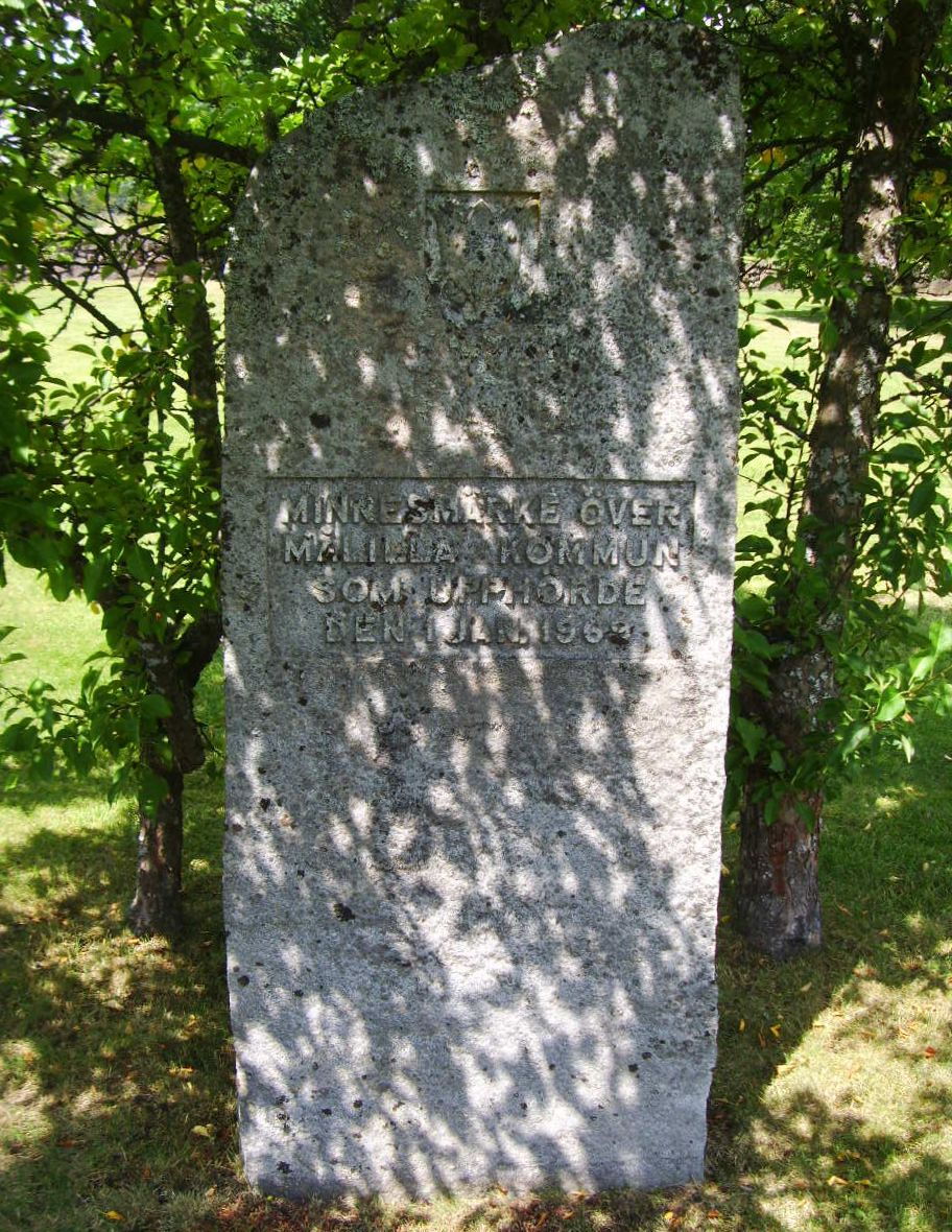 Minnessten över Målilla landskommun, invid Målilla kyrka. Texten på stenen lyder: "Minnesmärke över Målilla kommun som upphörde 1 jan 1969"